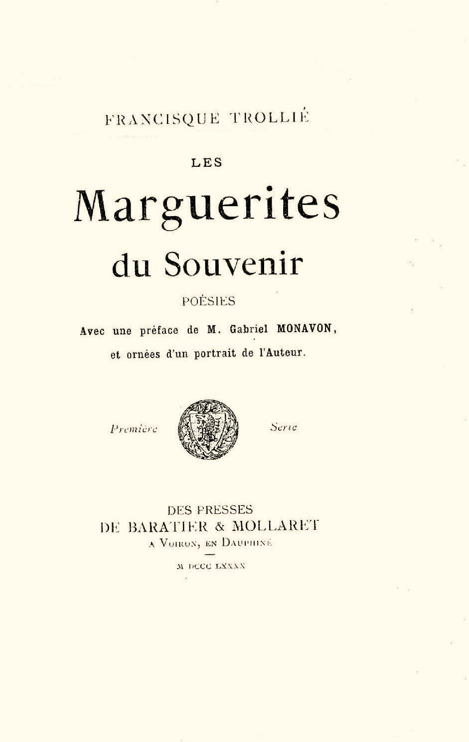 Un livre de poésies préfacé par Gabriel Monavon.